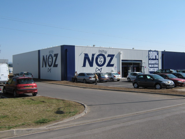 Facade du magasin Noz d'Issoire